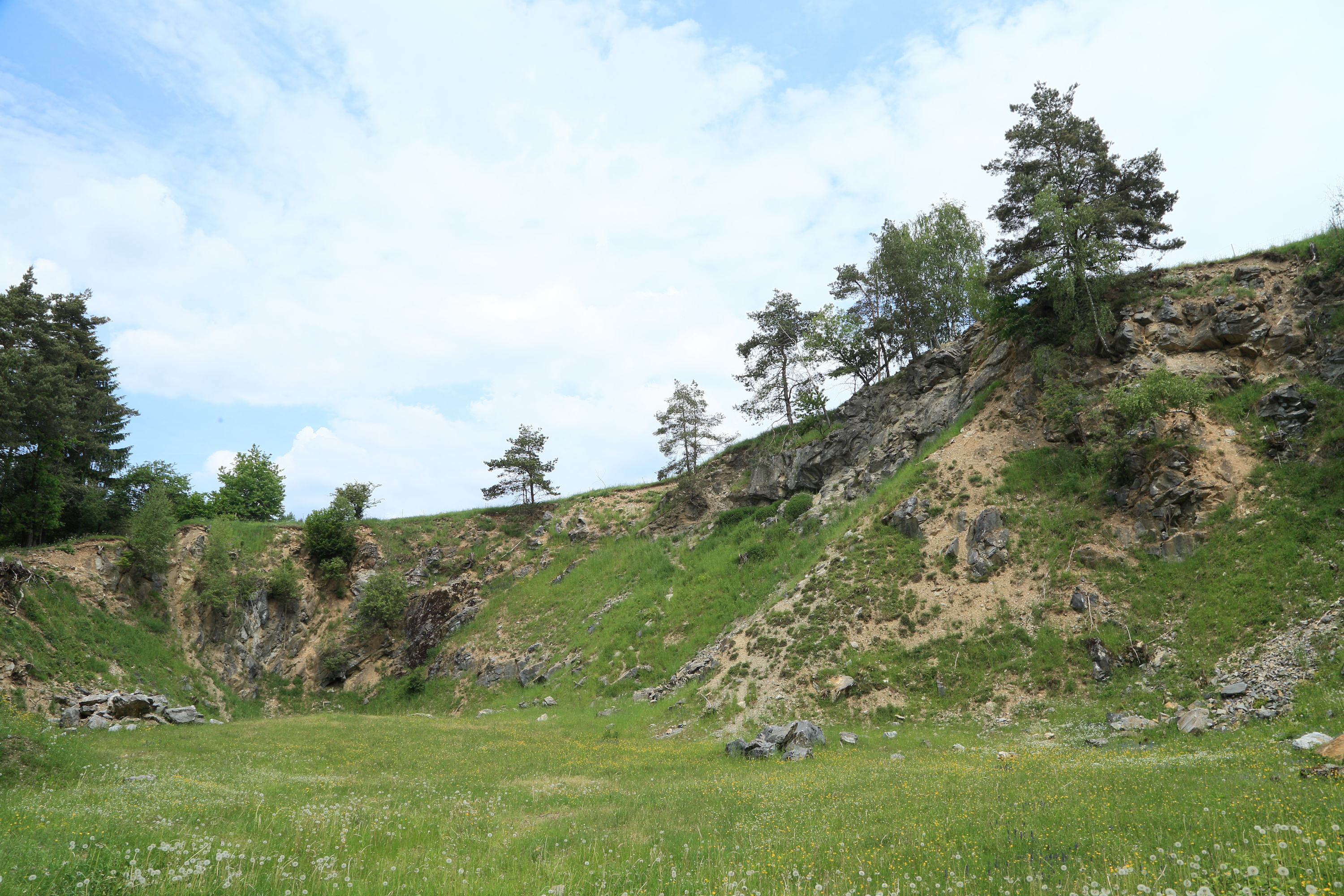 Geotop 377A003 Marmorsteinbruch Unterwappenöst/Kulmain/Oberpfalz Bayerns schönste Geotope Nummer 92